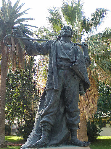 Barcelona - Escultura representant Manelic de l´obra d´Àngel Guimerà "Terra Baixa" als jardins Laribal